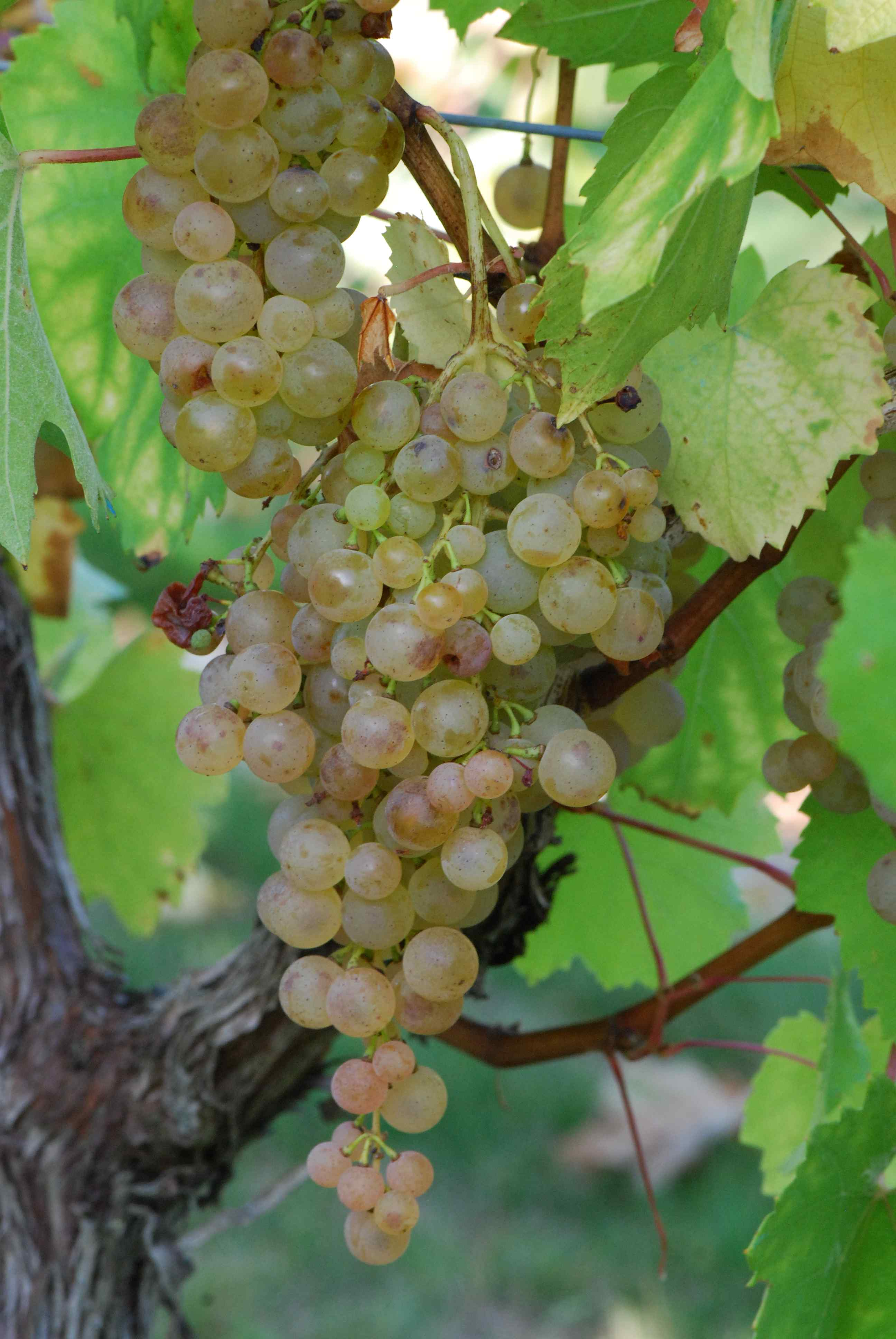 Bouilleaud B, Gouais, Conservatoire du vignoble charentais, Cherves